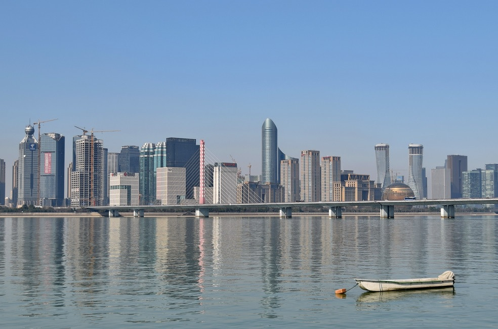 杭州 钱塘江-钱江新城